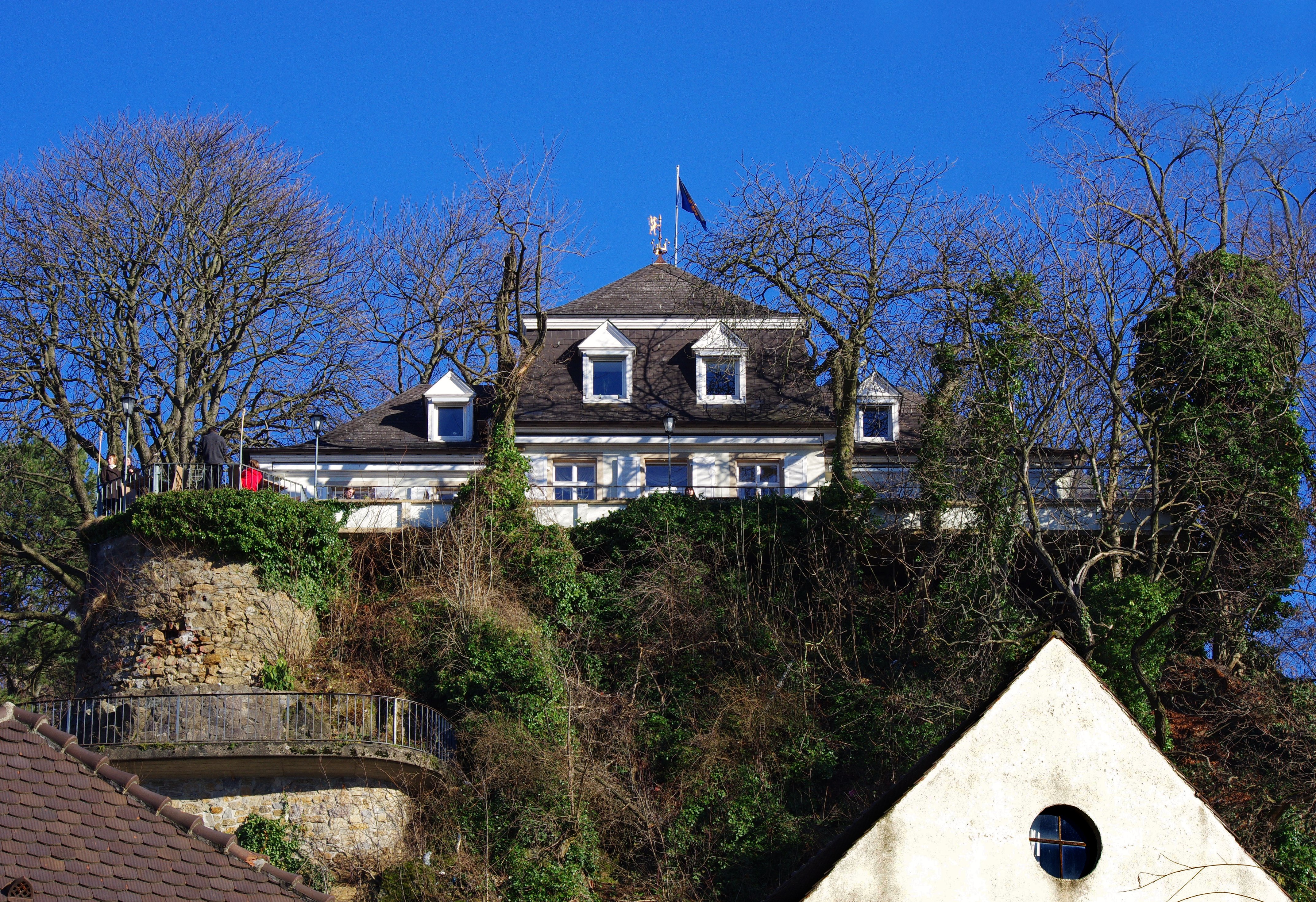 Greiffeneggschlössle